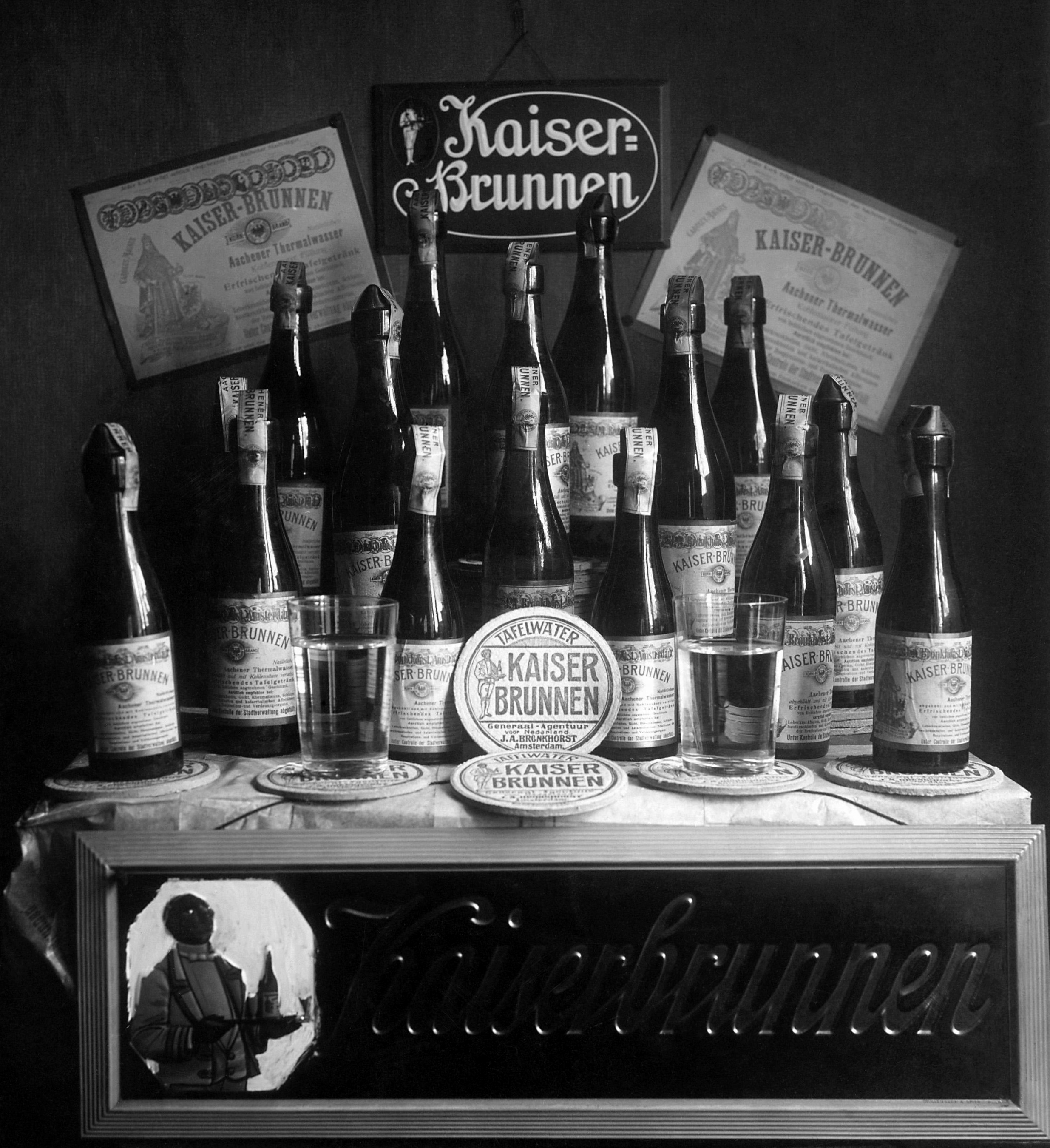 Tafel met vele flessen tafelwater / bronwater / mideraalwater erop van het merk Kaiserbrunnen. Nederland, 1918.